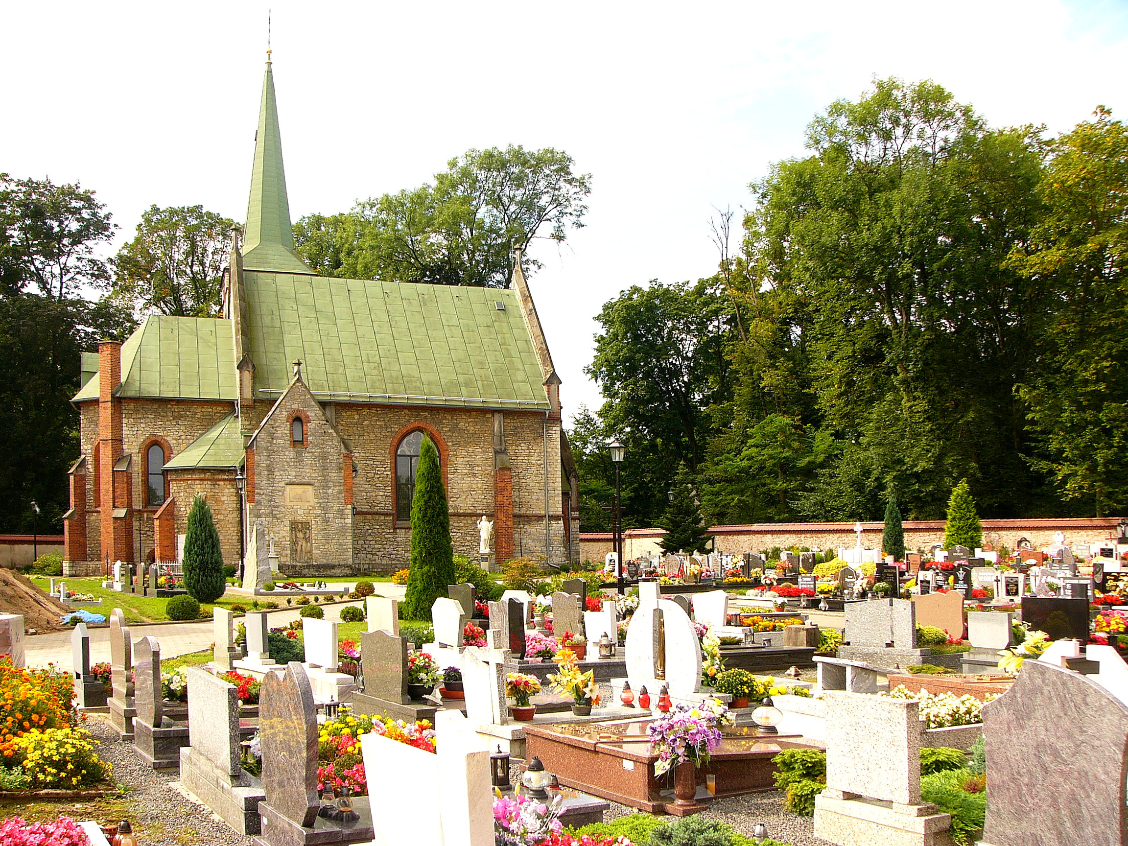 Dobra, ul. Szkolna 7 - zespół kościoła parafialnego pw. św. Jana Chrzciciela, 3 ćw. XIX